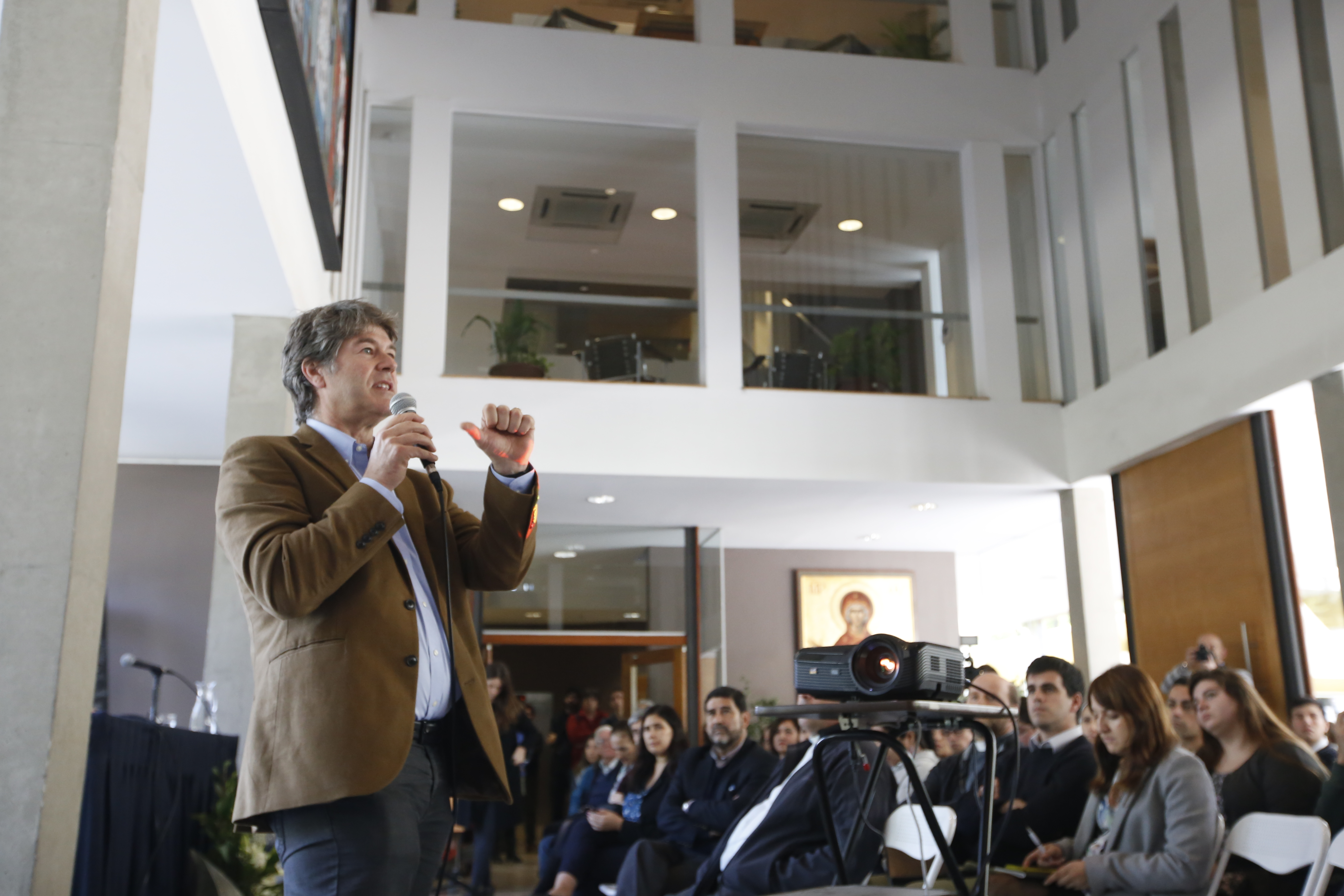 James Hamilton, médico chileno, denunciante del Caso Karadima.